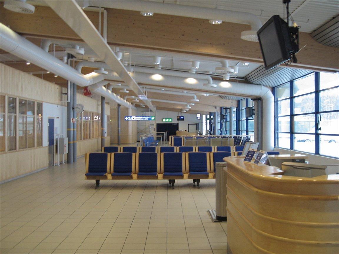 Bilde utover Gate 30 på Hastad/Narvik lufthavn evenes.